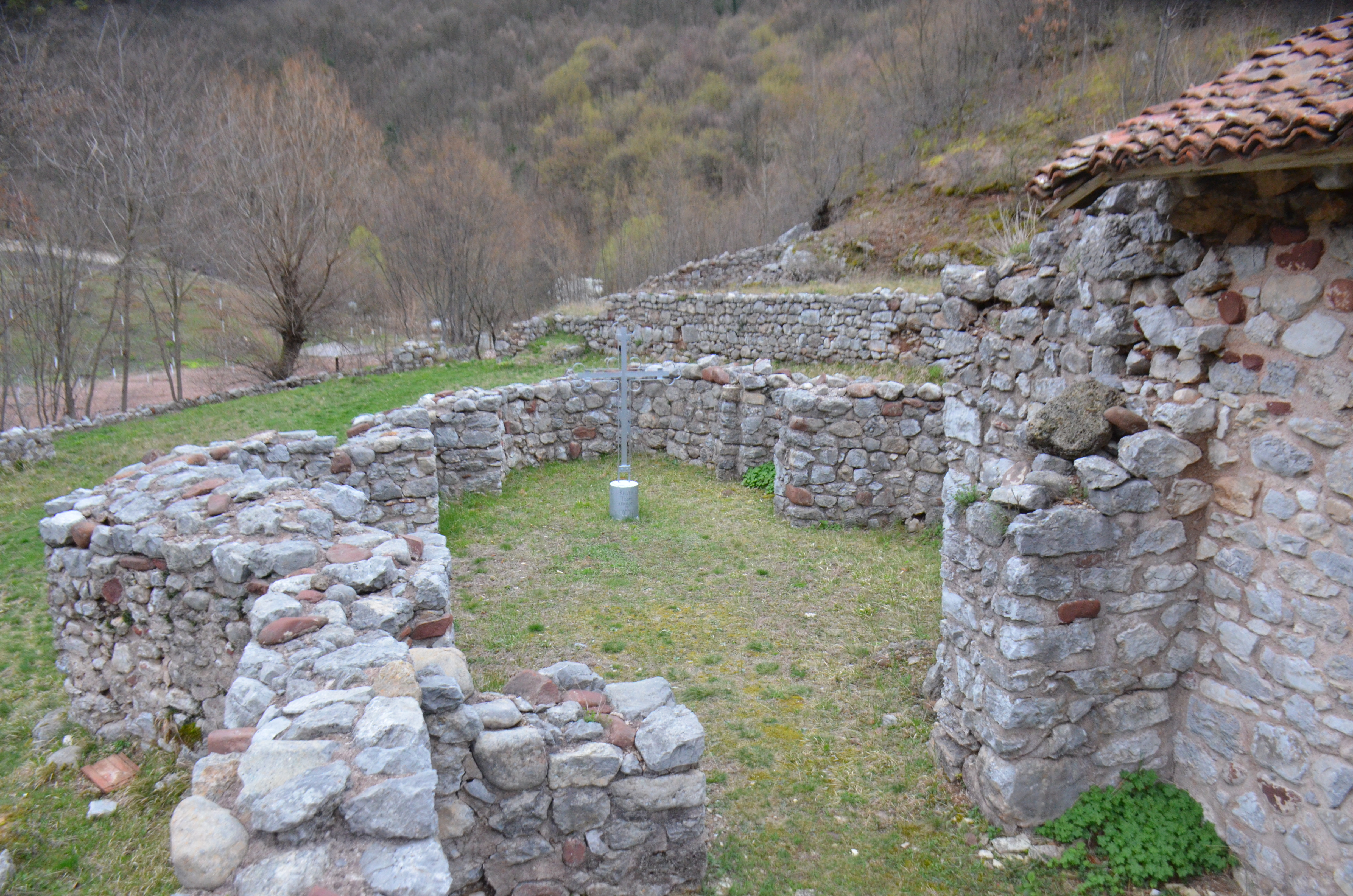 Споменик културе - Манастирски комплекс Намасија